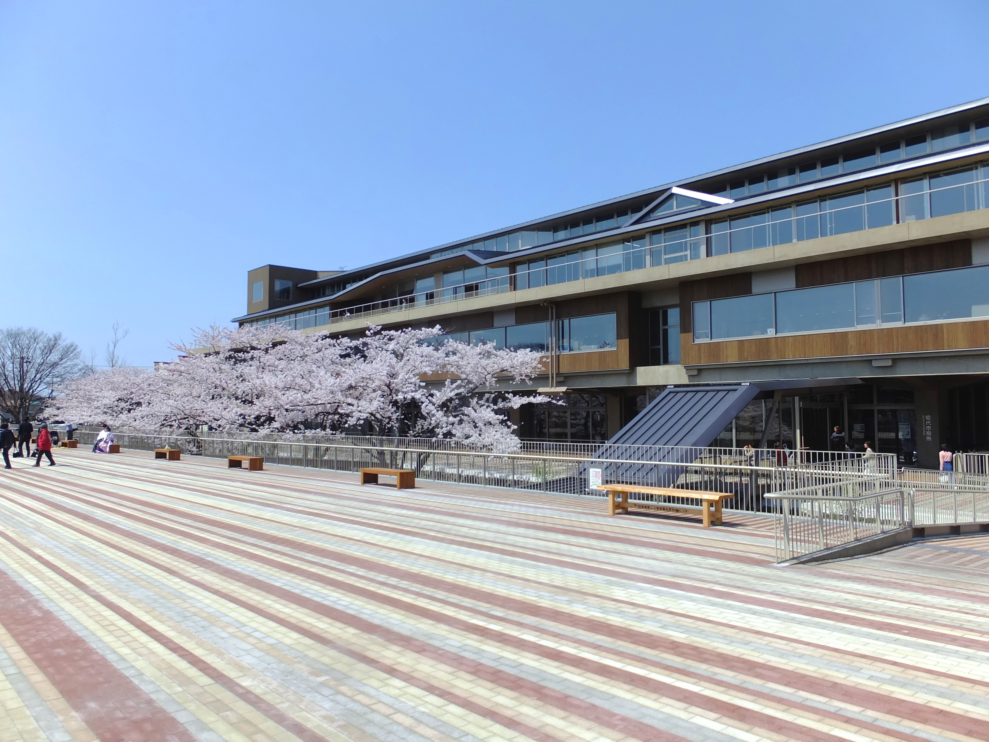 さくら庭と能代市役所新庁舎。